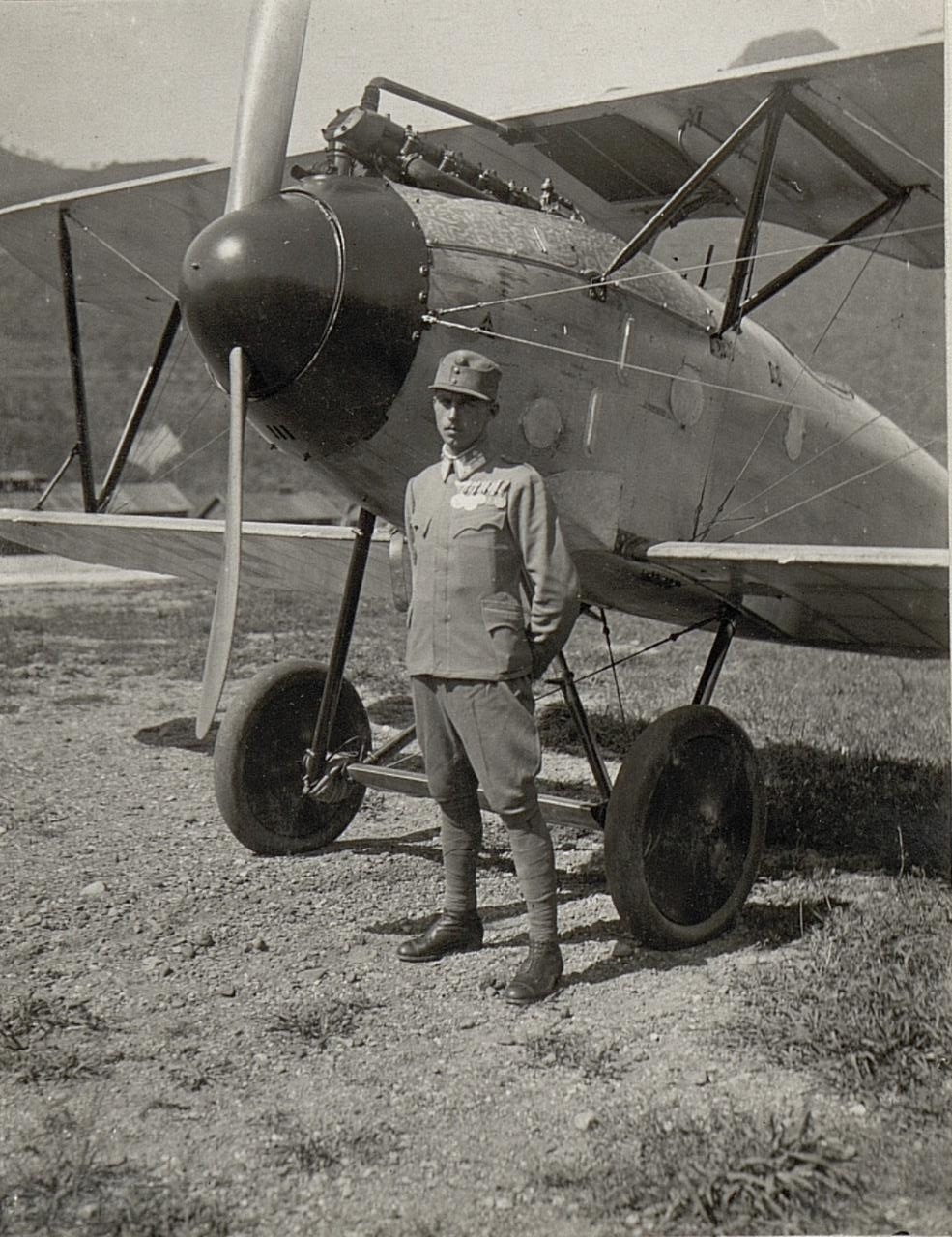 Stabsfeldwebel Kiss Josef